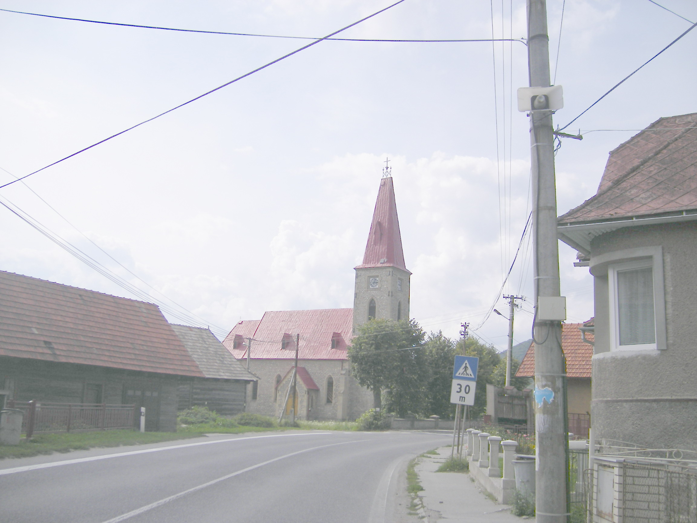 Sedliacka Dubová (okres Dolný Kubín)